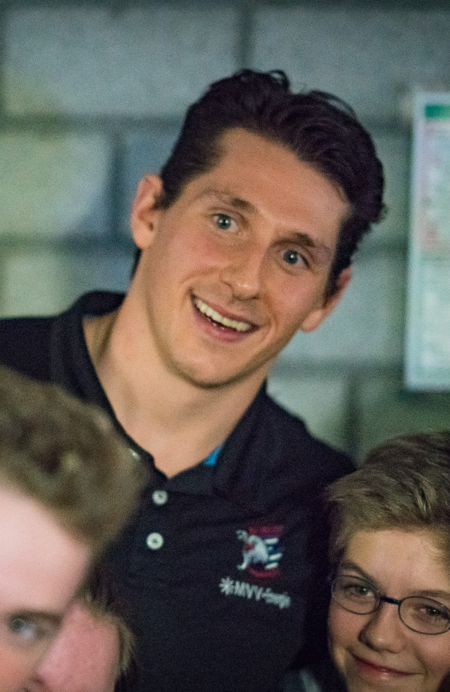 Saisonabschluß-"Feier" 24.3.2017 SAP-Arena